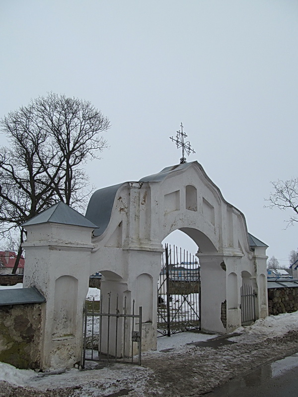 Лаздуны 1. Касцёл Святых Сымона і Тадэвуша